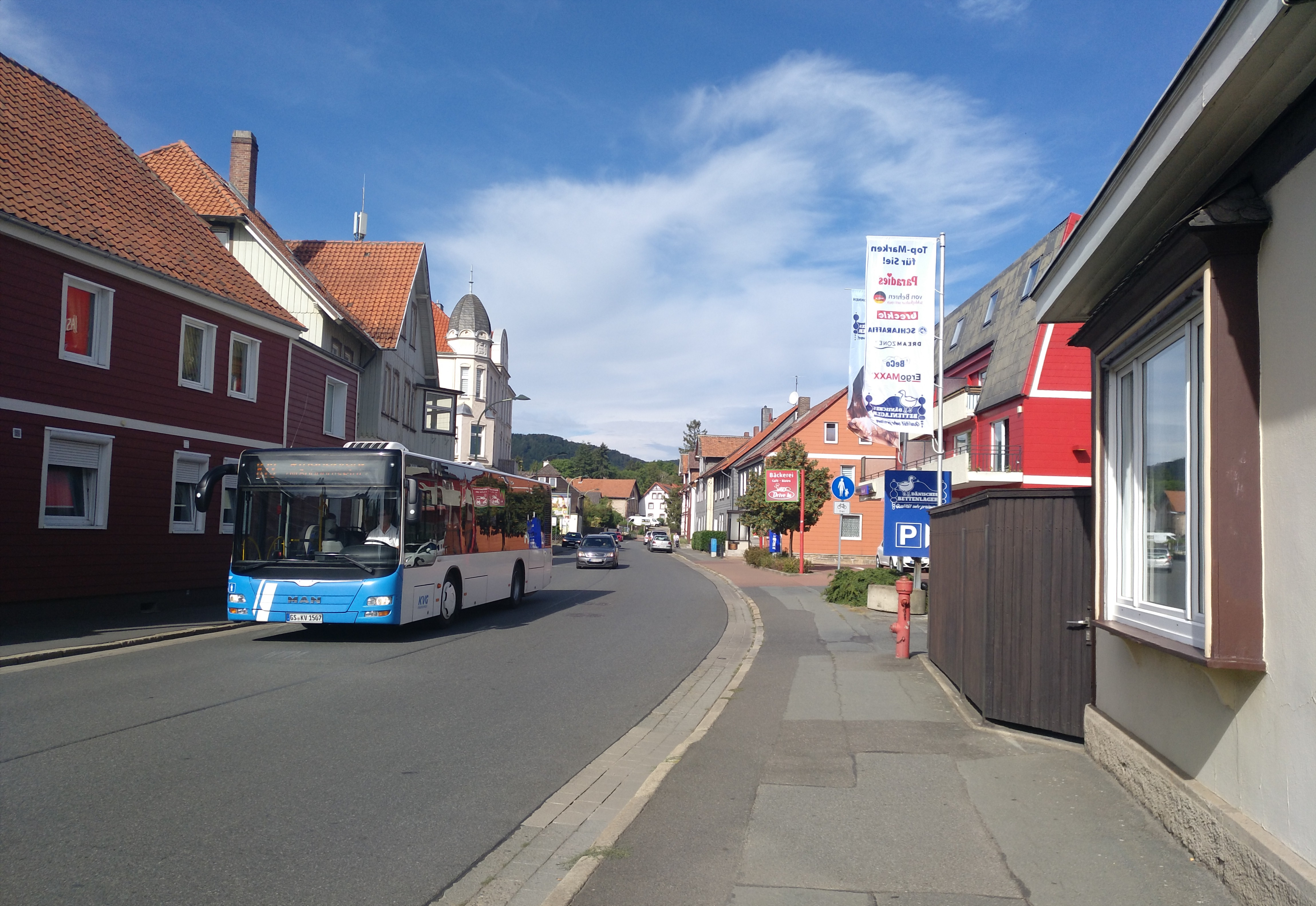 Blick auf die Dr.-Heinrich-Jasper-Straße in Bündheim, mit Bus der KVG Linie 873.